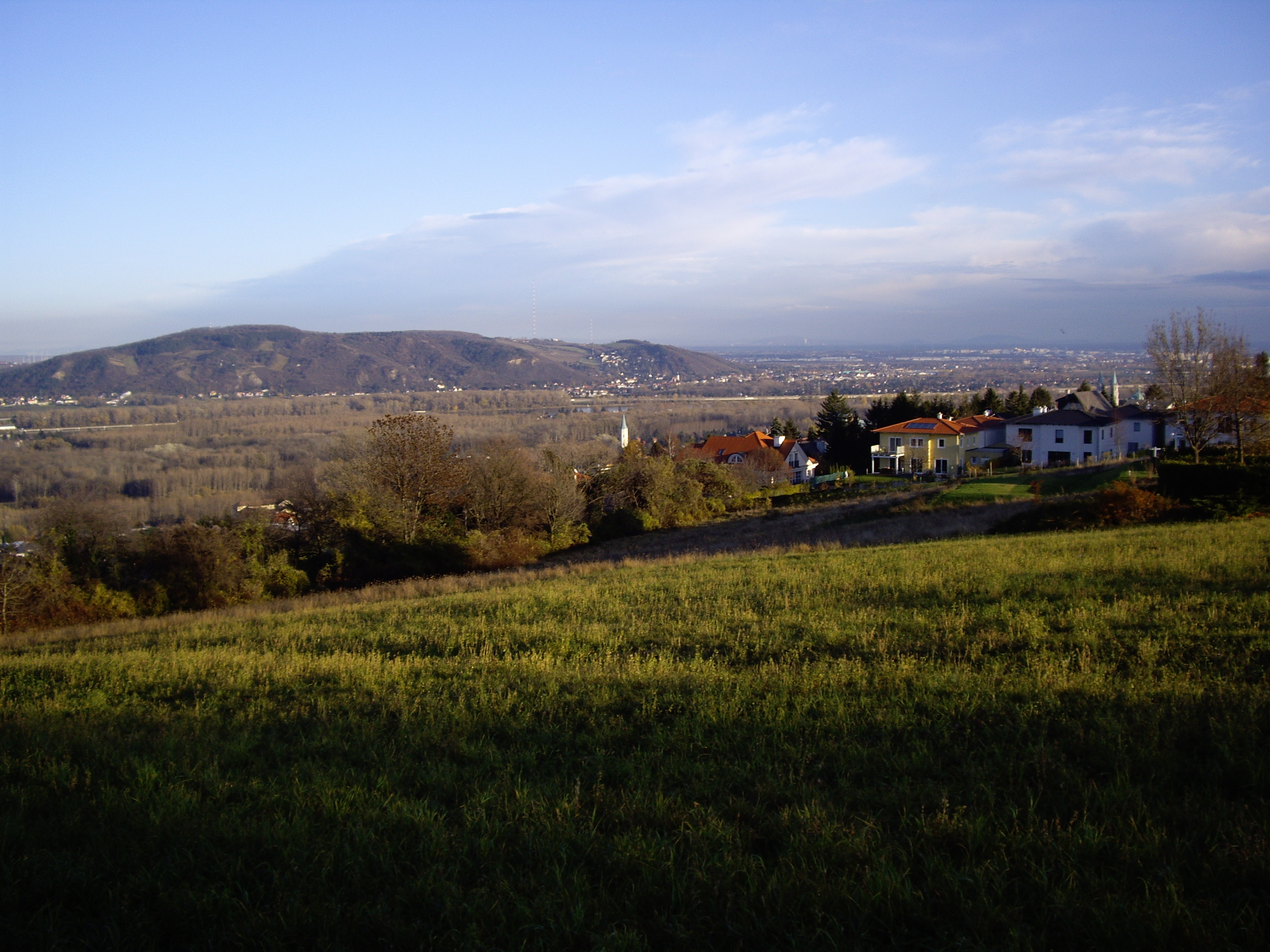 Rigardo de Klostronovburgo kun la turoj de la Marteno-Kirko kaj Abatejo-Kirko al Bisammonto.